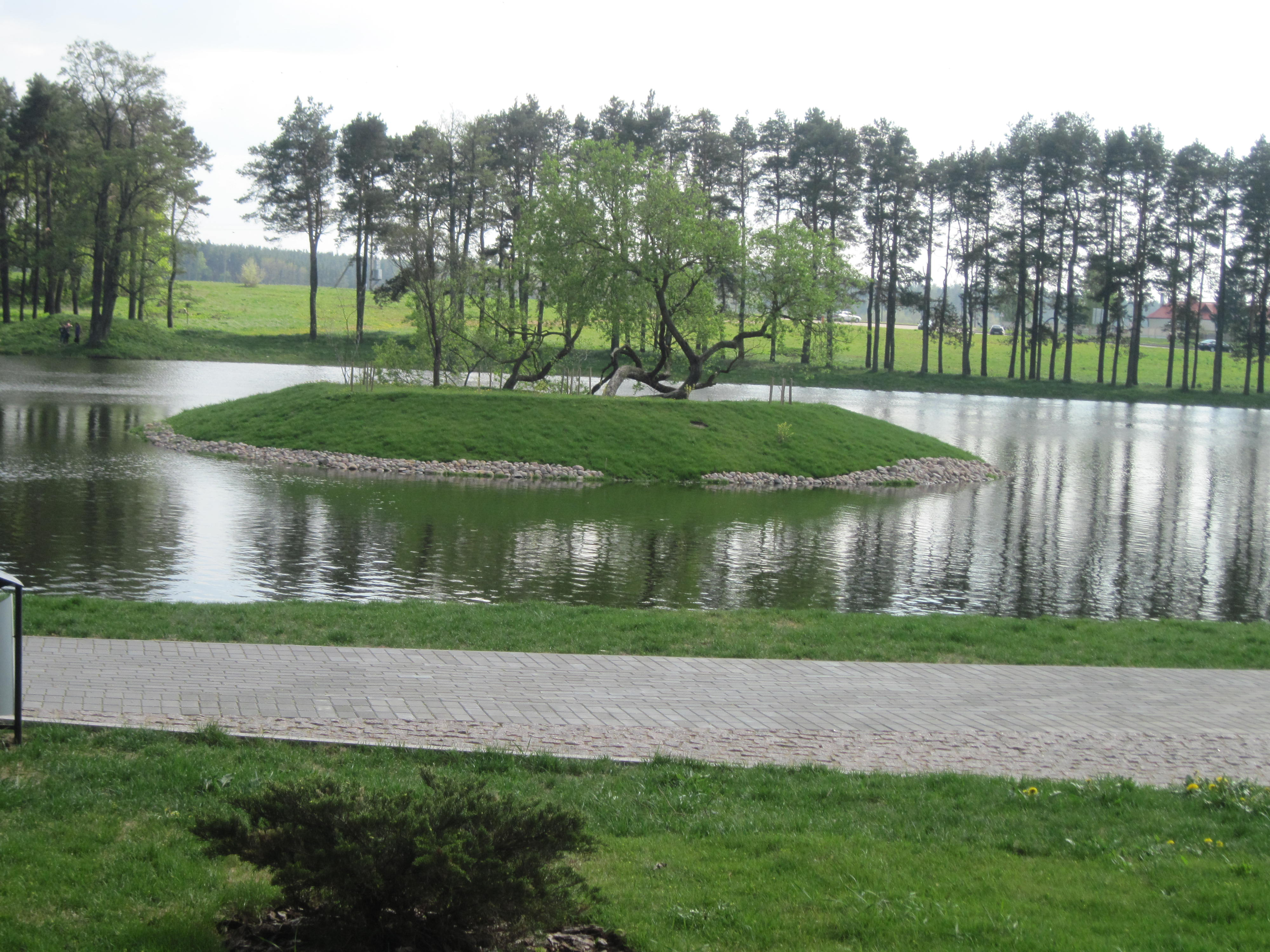 Замкавая сажалка ў Міры